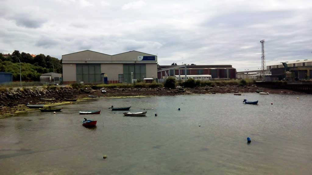 Vista de Imenosa en Fene.